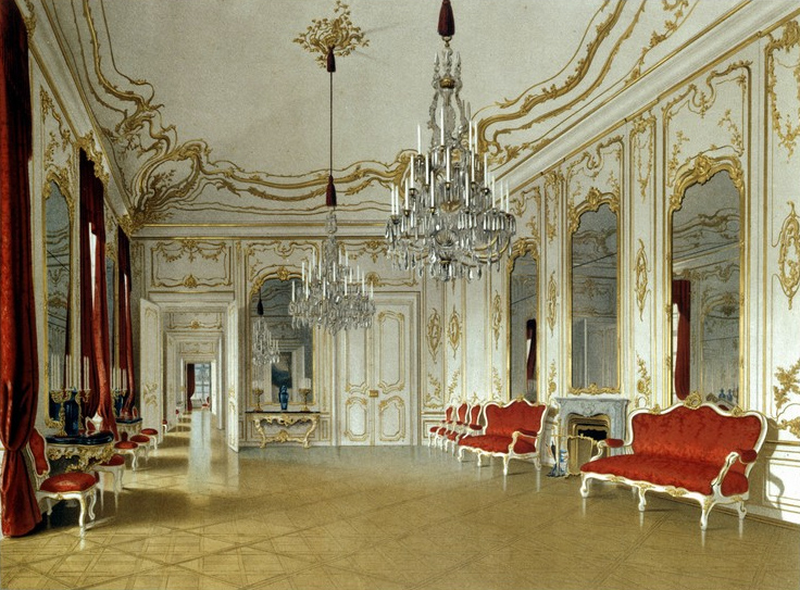 Der Spiegelsaal in Schloss Schönbrunn, Empfangssalon des Kaisers und der Kaiserin.